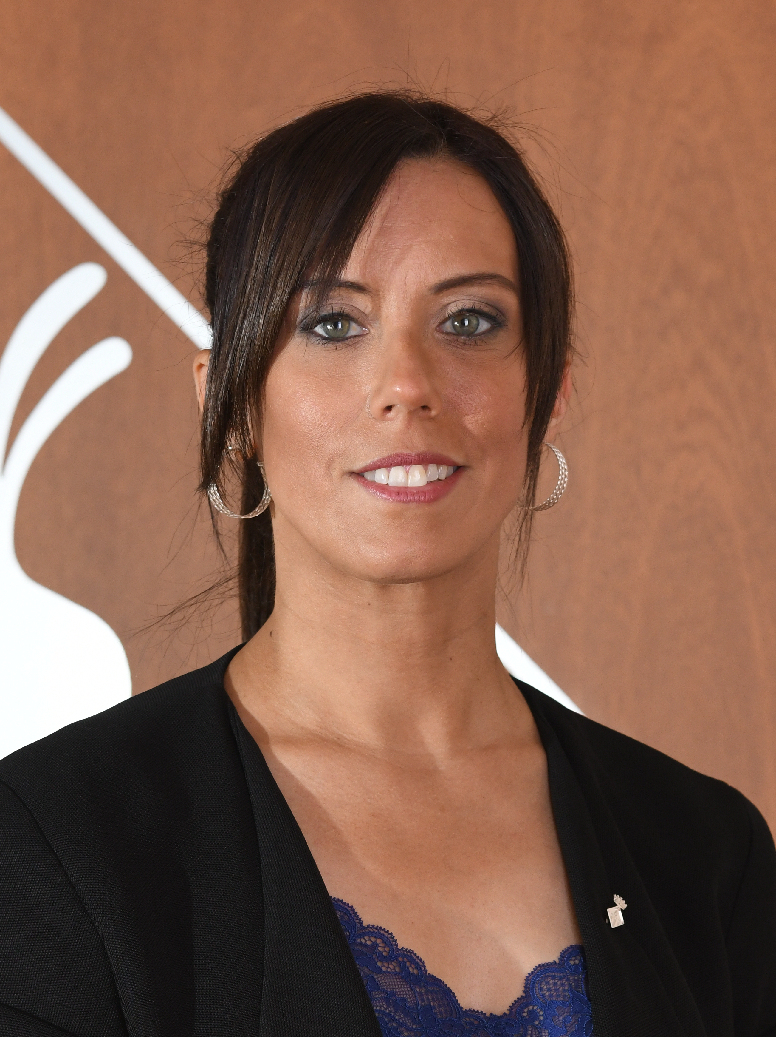 Marta Farrés, Alcaldessa